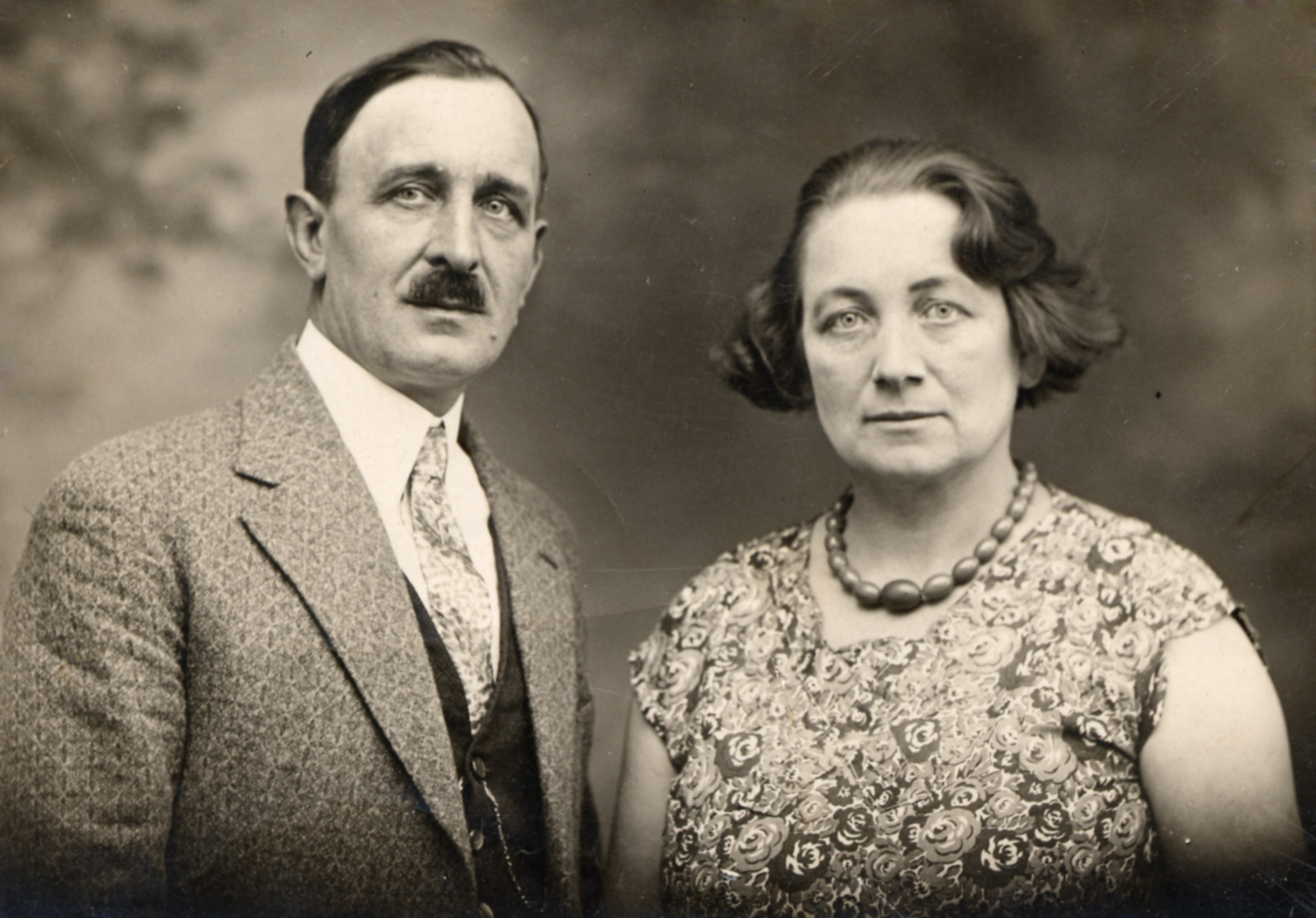 Lucien Collot (1890-1975) et son épouse Marie Boisson (1893-1983)